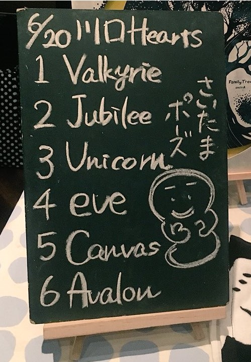 amiinAセトリボード(20180620(1))